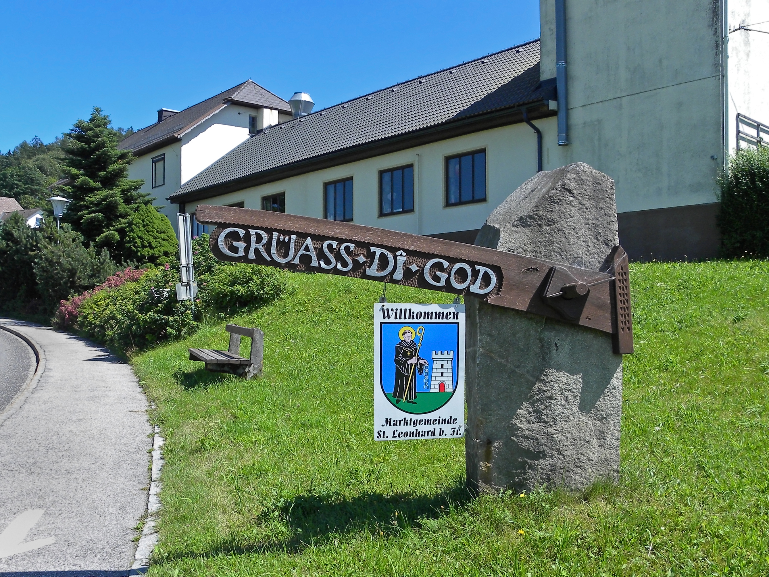 Begrüßung an der Ortseinfahrt von Sankt Leonhard